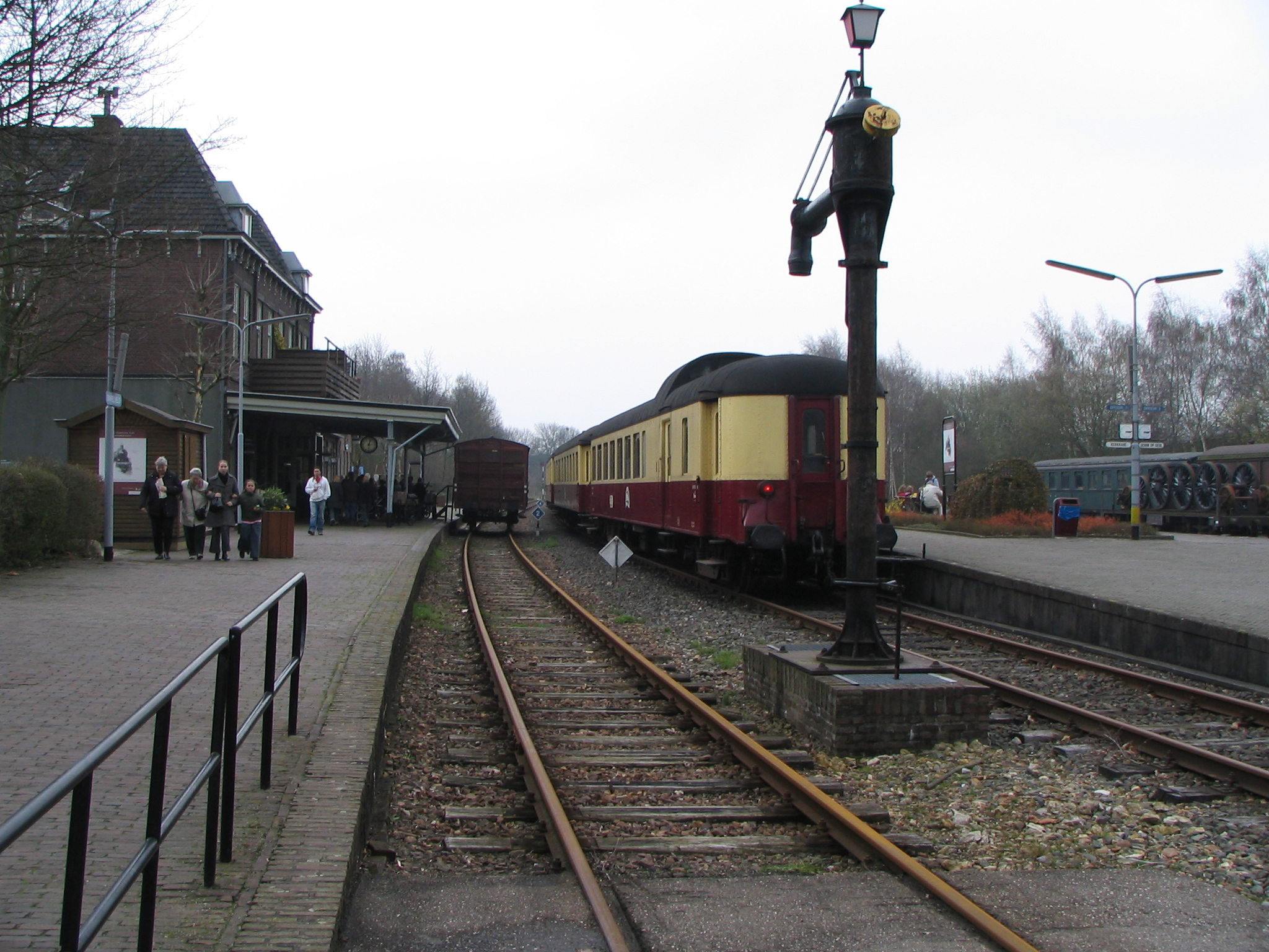 Station Simpelveld, blik op de trein uit Schin op Geul en het stationsgebouw